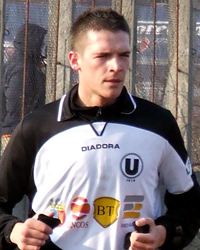 Fotbalistul Andrei Cordoș în 2008